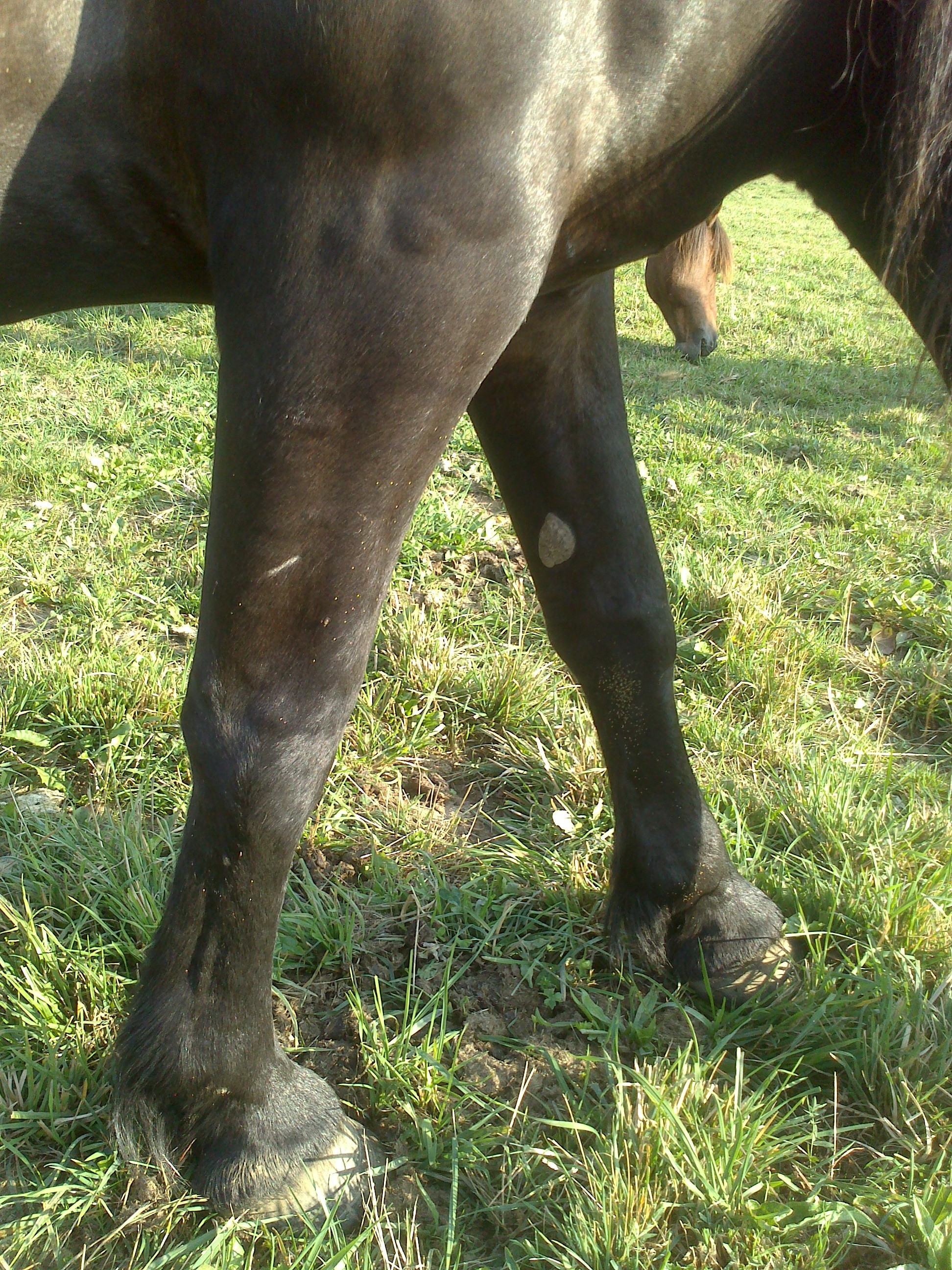 Cheval Barraquand à Autrans (Isère, Rhône-Alpes, France)